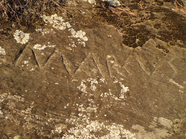 Marcus, Graffiti (Coudoulous, Lozère)